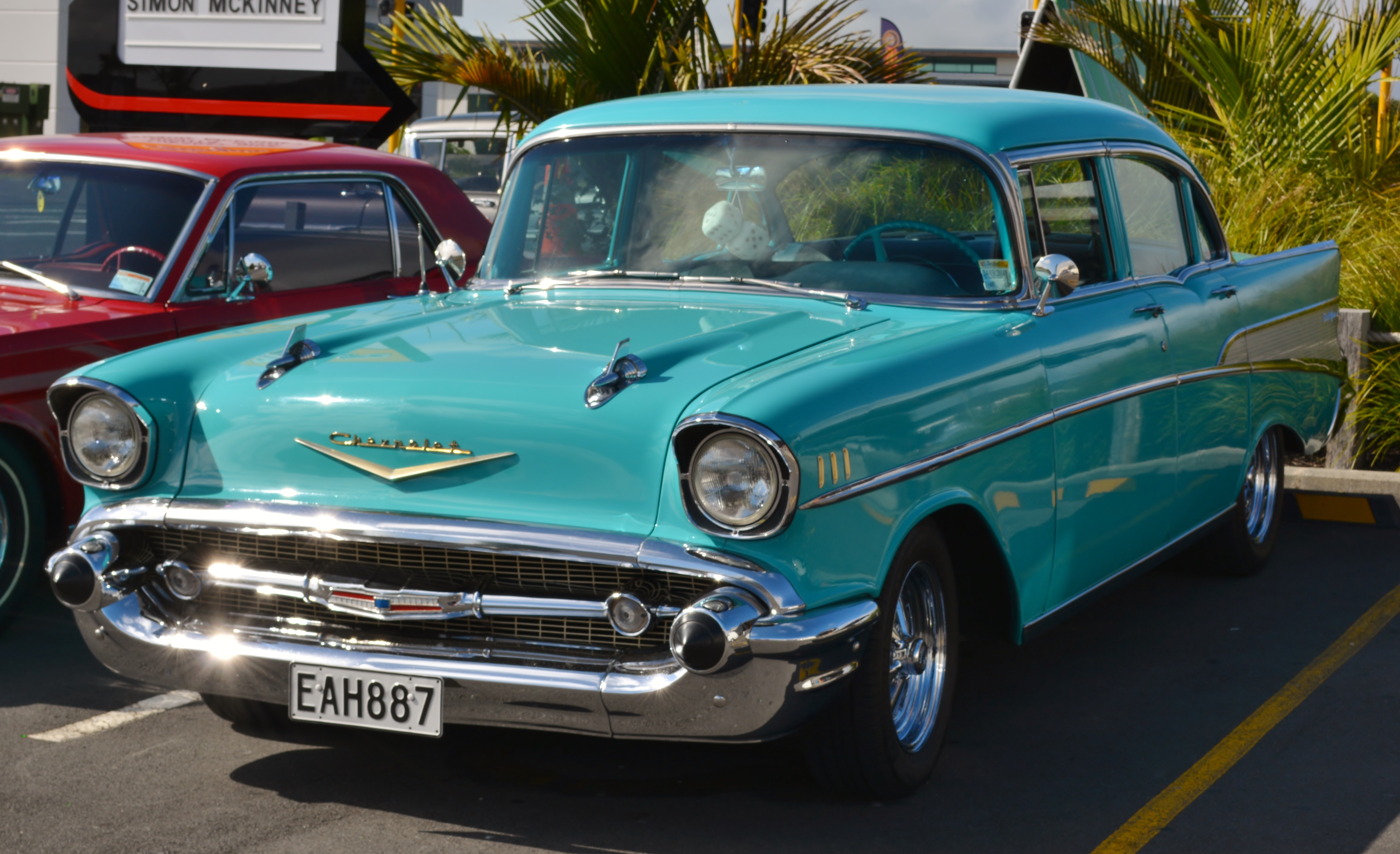 1957 Chev 4door